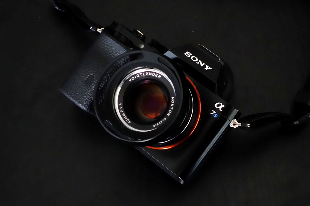 Sony α7s